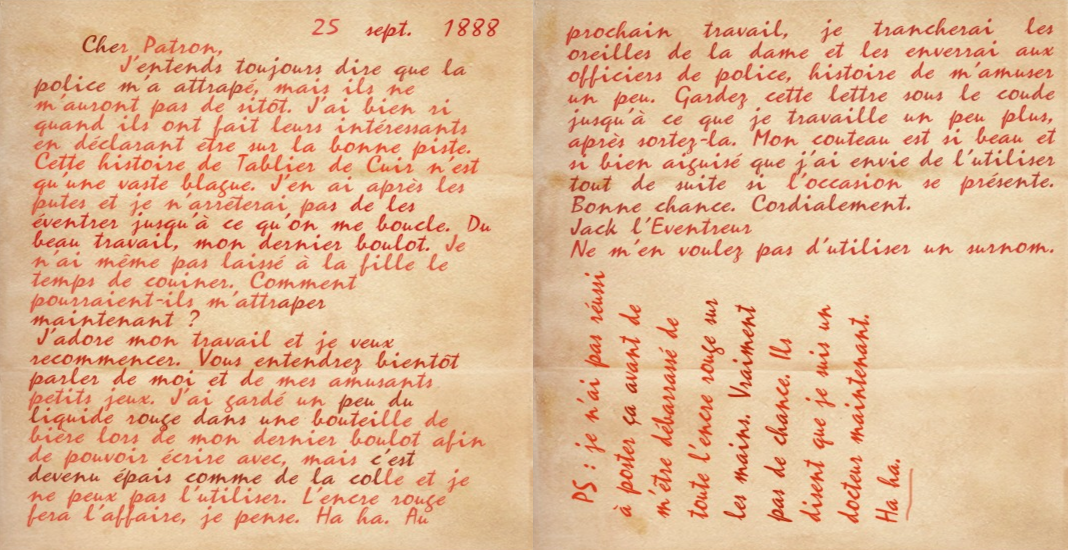 Capture d'écran du jeu Sherlock Holmes contre Jack l'Éventreur. Il s'agit d'un assemblage de deux captures d'écran relatives à la lettre "Dear Boss" bien connue des ripperologues.